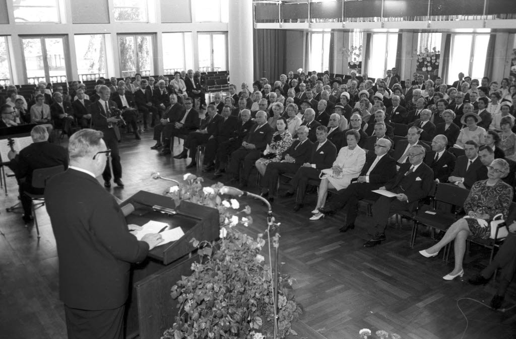 An den Bankier Dr. h.c. Hermann Josef Abs (1. Reihe 2. v. r.) durch den Direktor des Instituts für Weltwirtschaft (IfW) Prof. Dr. Erich Schneider (links am Redepult) im Schloss. In der 1. Reihe v. r. Kultusminister Claus Joachim von Heydebreck (5.), Justizminister Gerhard Gaul (8.), der Rektor der CAU, Prof. Dr. Ludwig Weisbecker (10.) und Stadtpräsident Hermann Köster (11.).